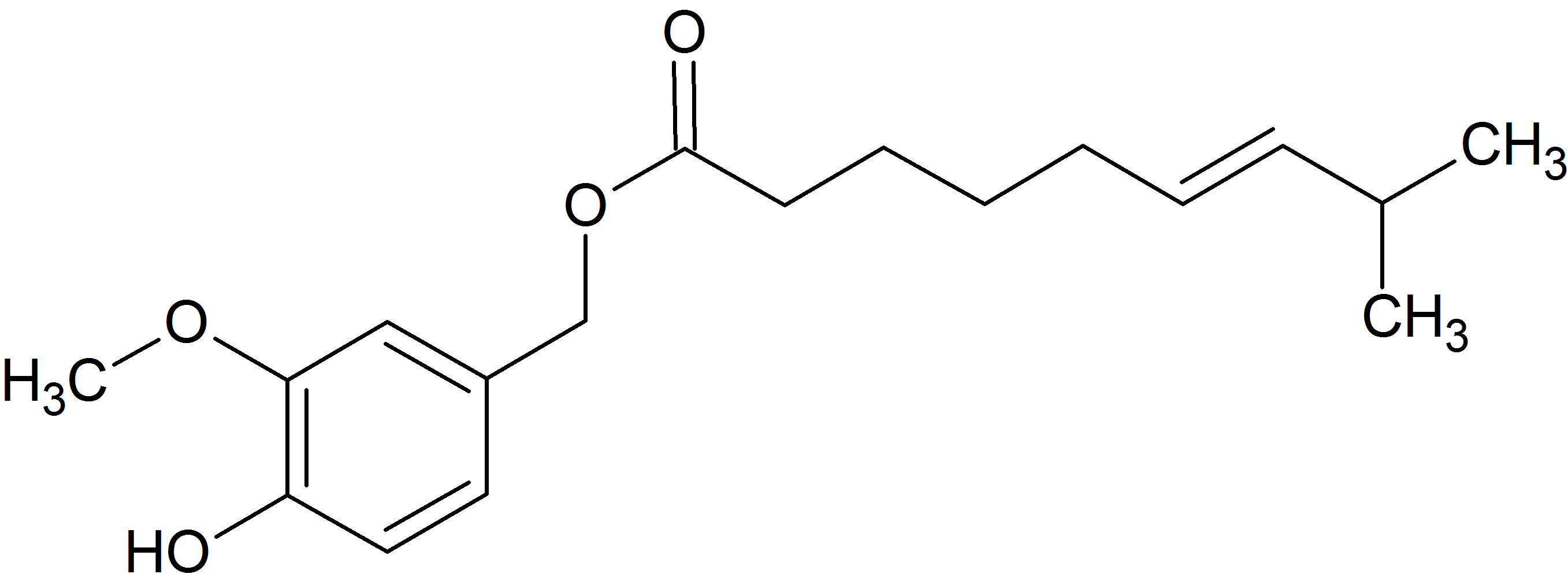 Capsiate - CAS 6219-63-2